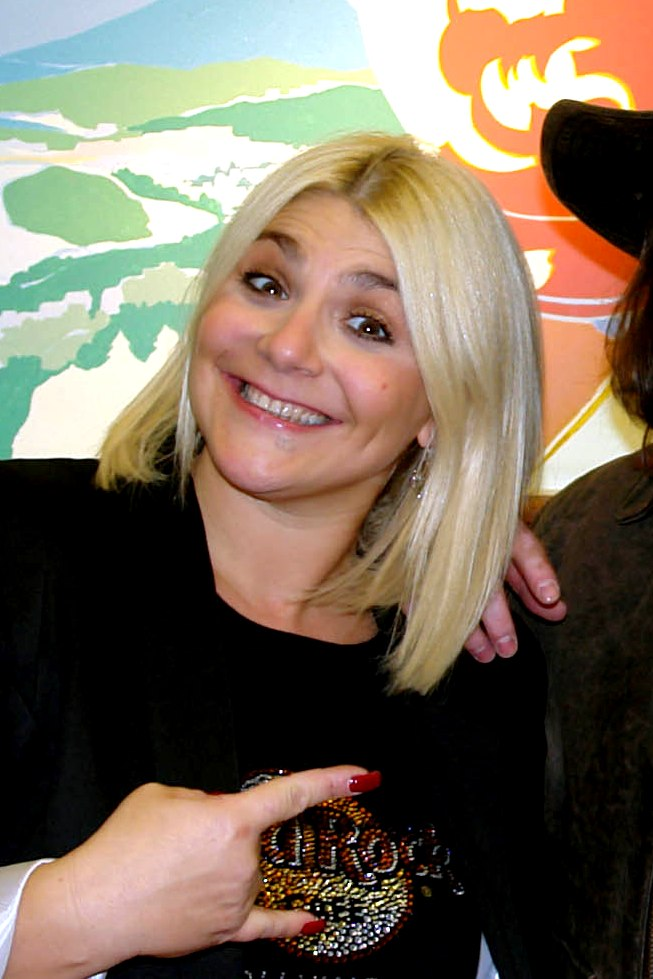 Sandra Kim, 22 septembre 2012.